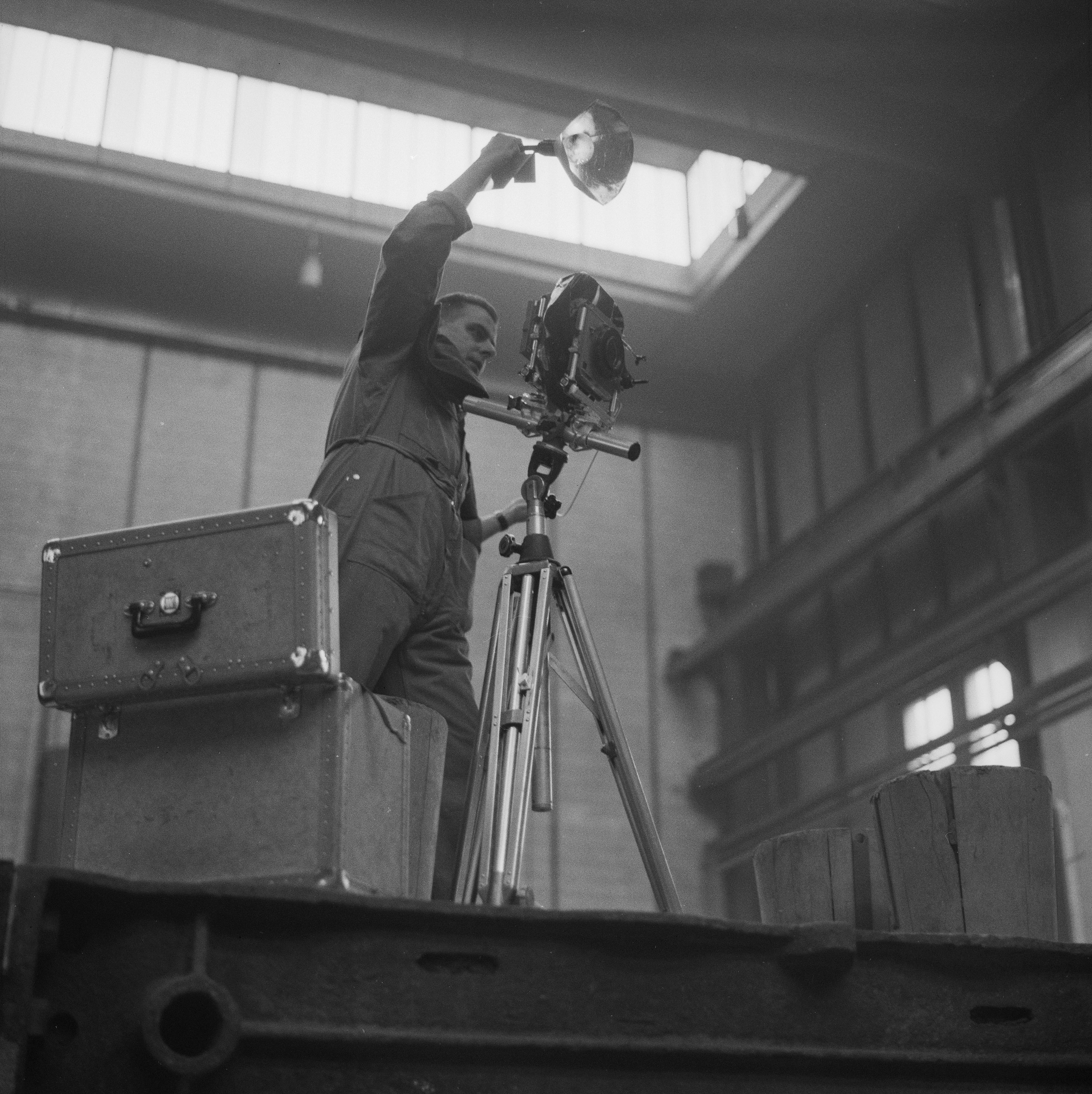 Werkfotograf Max Graf bei der Arbeit in der Stahlgiesserei der Georg Fischer AG in Schaffhausen, 1966